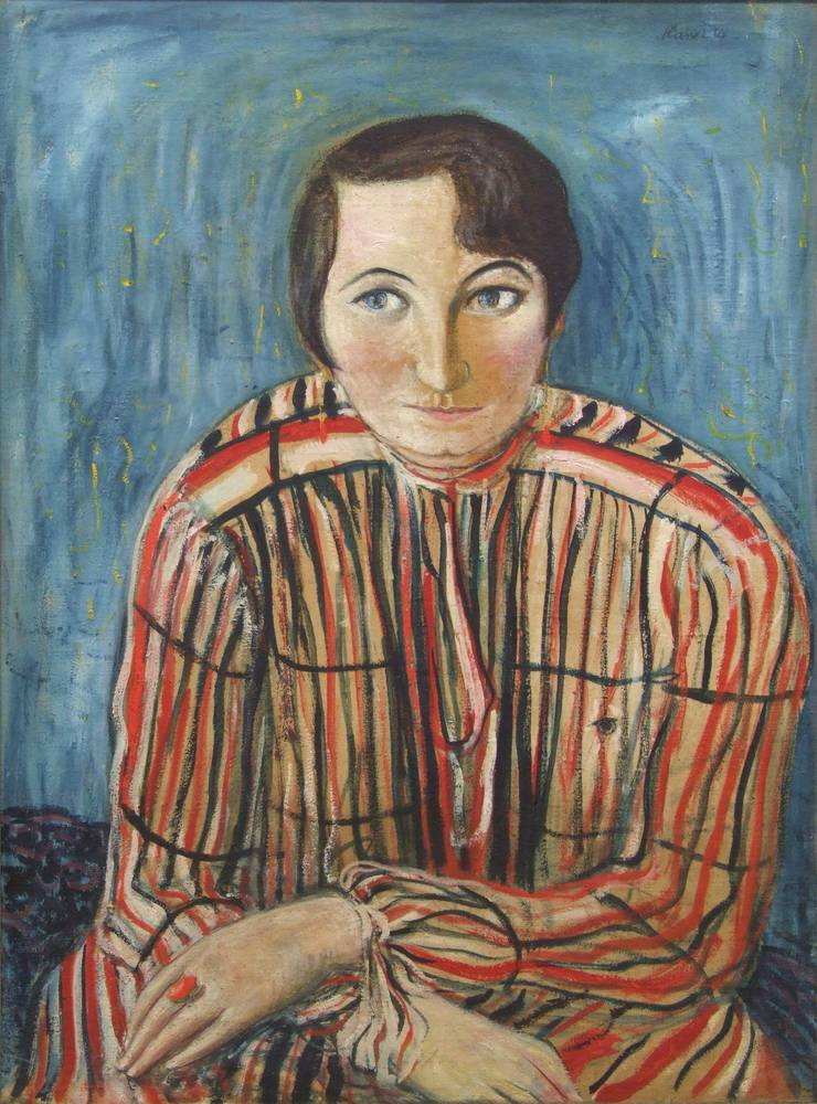 Bildnis der Fotografin Genja Jonas von Pol Cassel, 1926. Öl auf Leinwand, 95 x 70 cm, Galerie Neue Meister Dresden